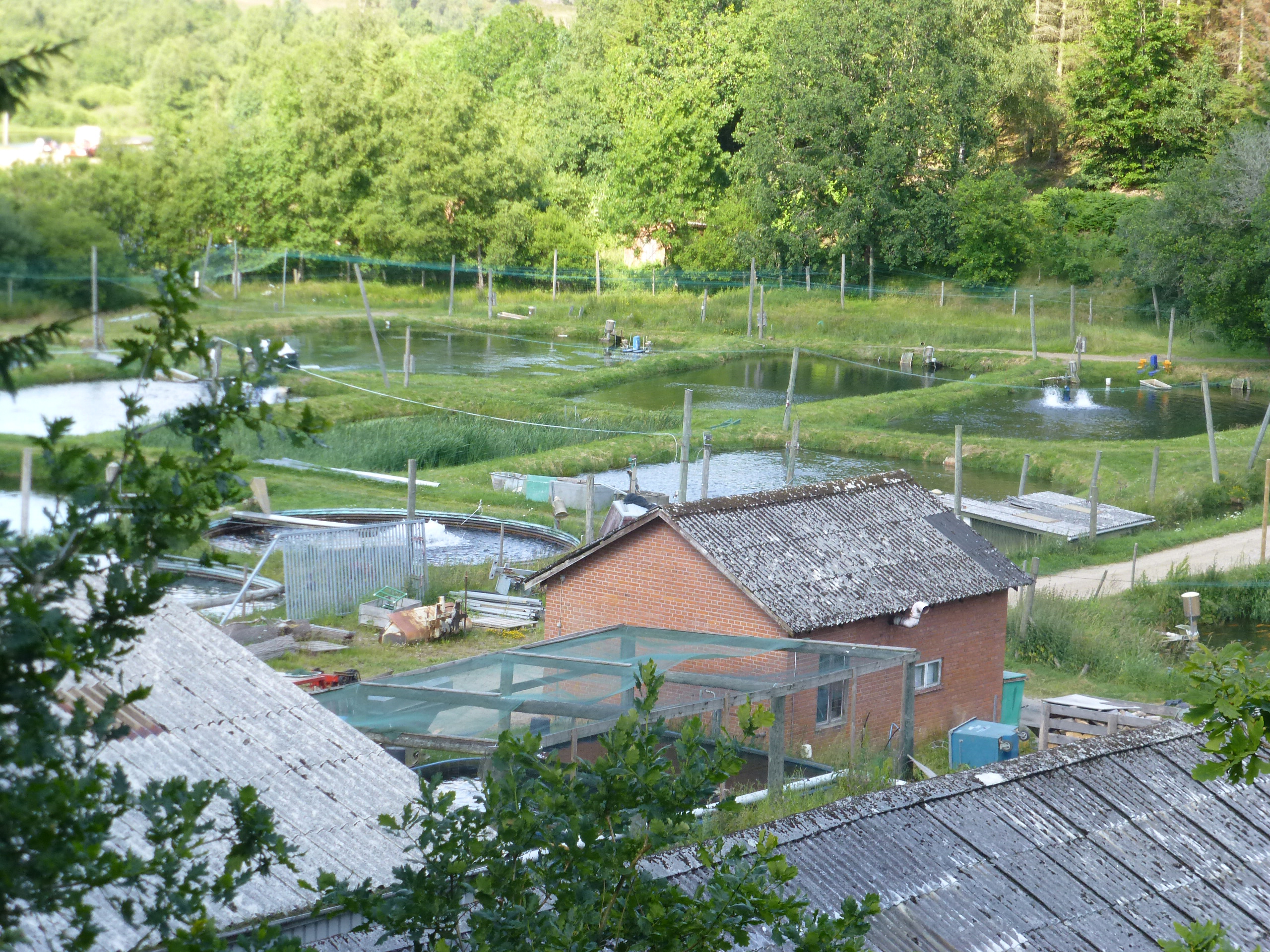 Kildedambrug nord for Vrads Station